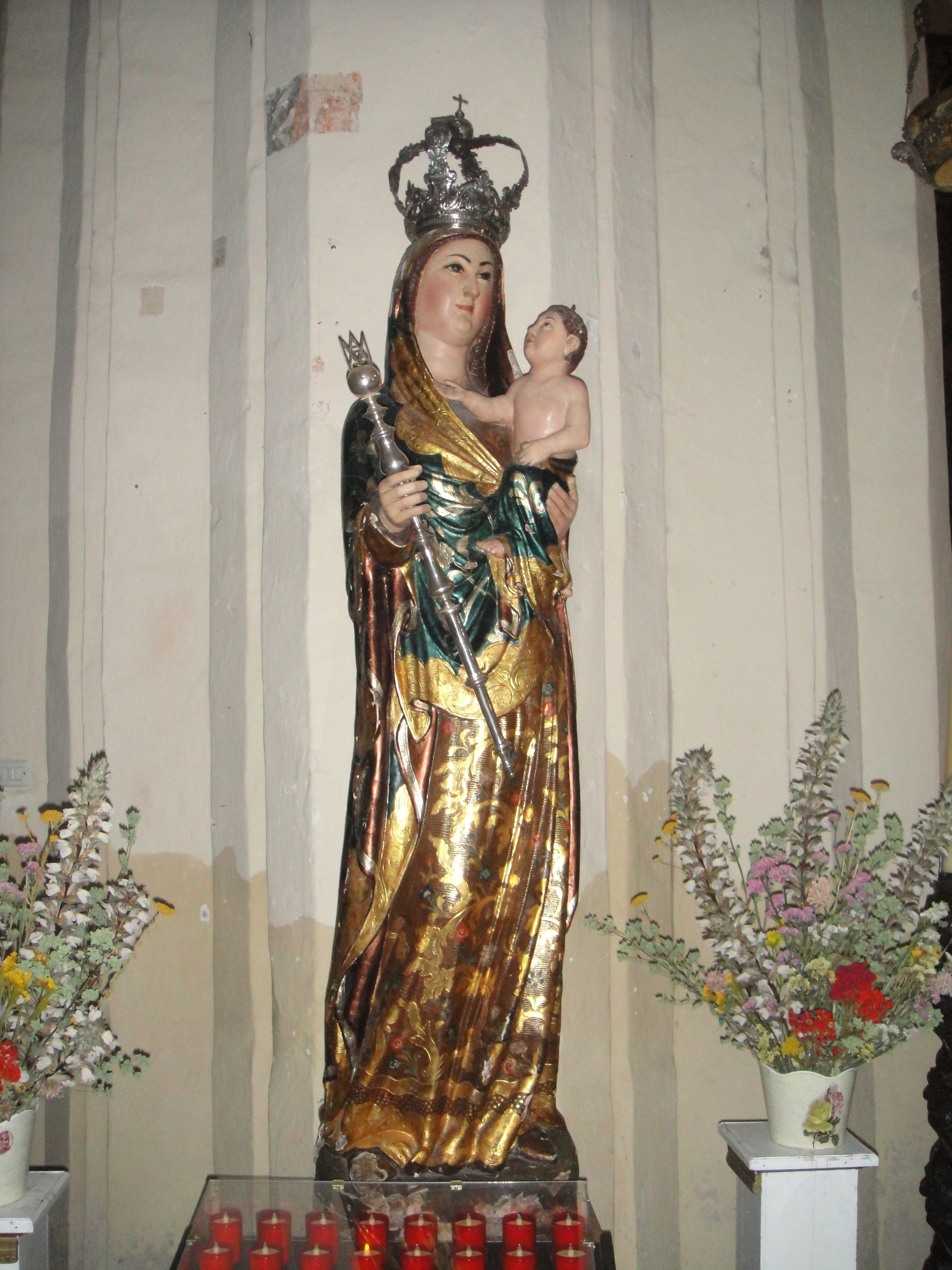 Imagen de Ntra. Sra. del Castillo en la iglesia de Nuestra Señora del Castillo de Fuente Obejuna, provincia de Córdoba, (España).